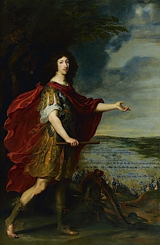 Louis, Grand Condé